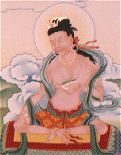 Maitripa (1007-1078), Mahasiddha